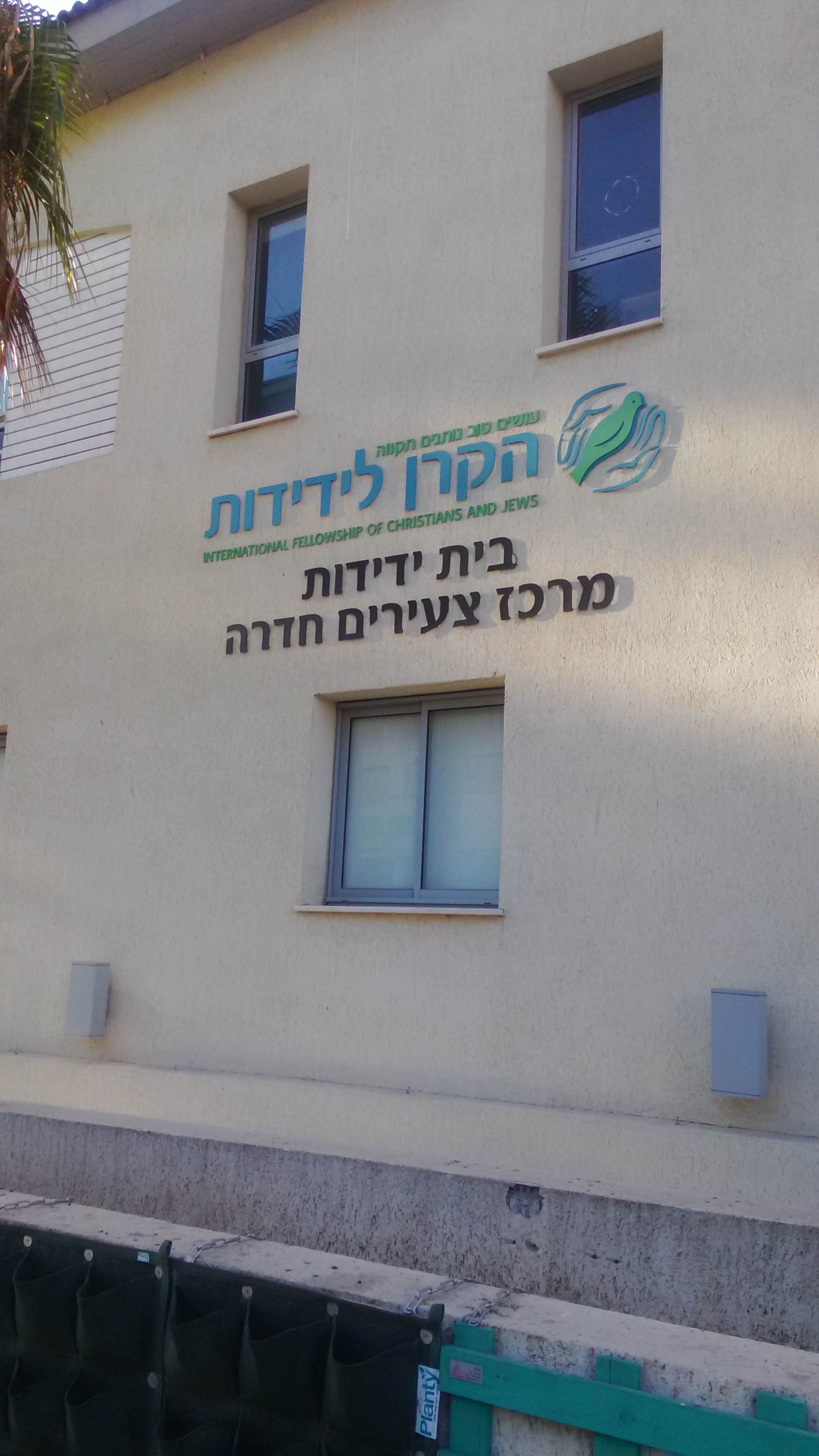 מרכז הצעירים בחדרה